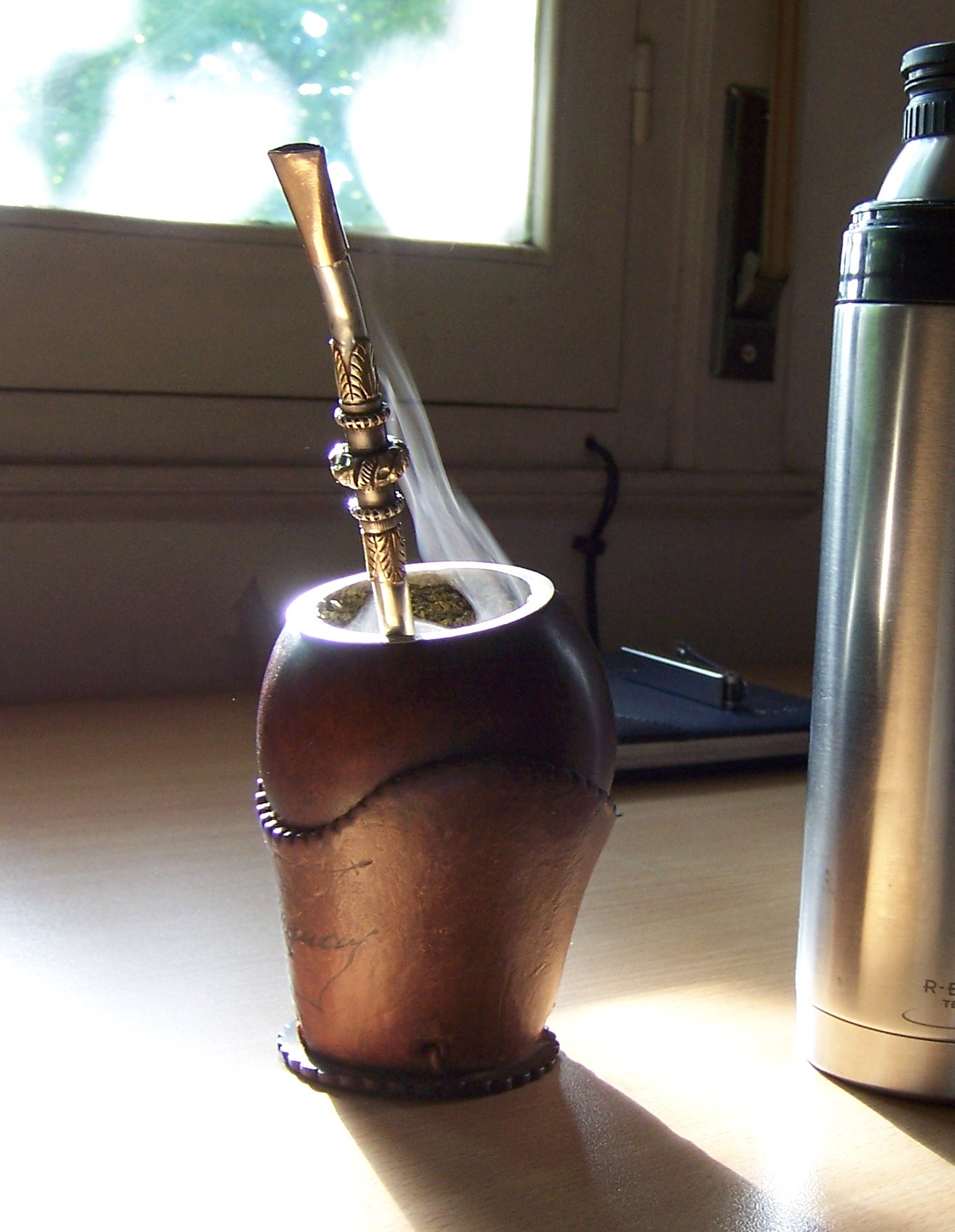 Mate (bebida) y termo sobre el escritorio.